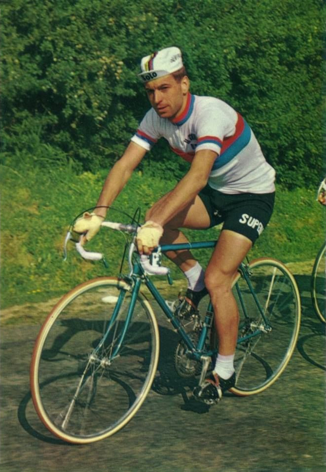 Rick Van Looy en 1966 241- Campioni dello Sport 1966-1967, n°241.